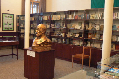 Salono de la Esperanto-muzeo en Svitavy